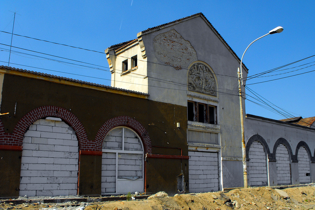 Hala Matache Macelaru